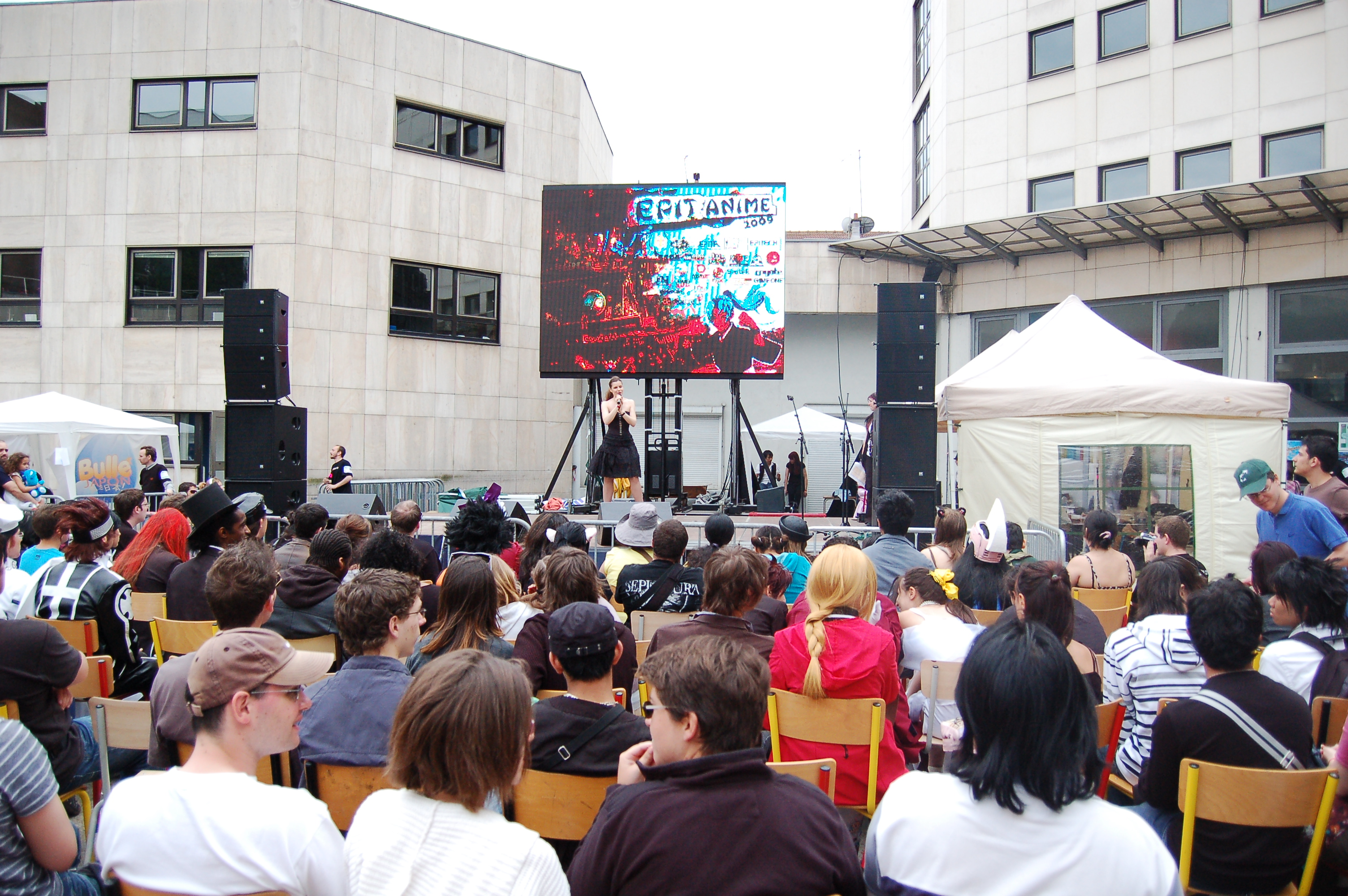 Convention de l'animation de l'EPITA 2009 - Karaoke